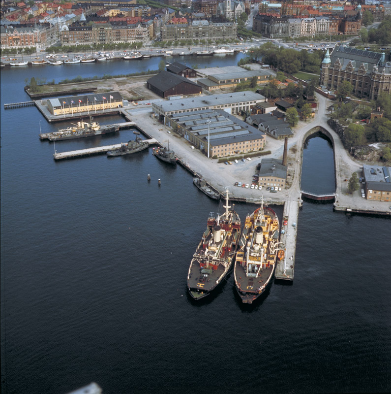 Galärvarvet från söder, Strandvägen upptill i bild. Motiv: Djurgården Nyckelord: Flygbilder Kategori: Kust- och skärgårdsmiljö, Varv Galärvarvet från söder, Strandvägen upptill i bild.